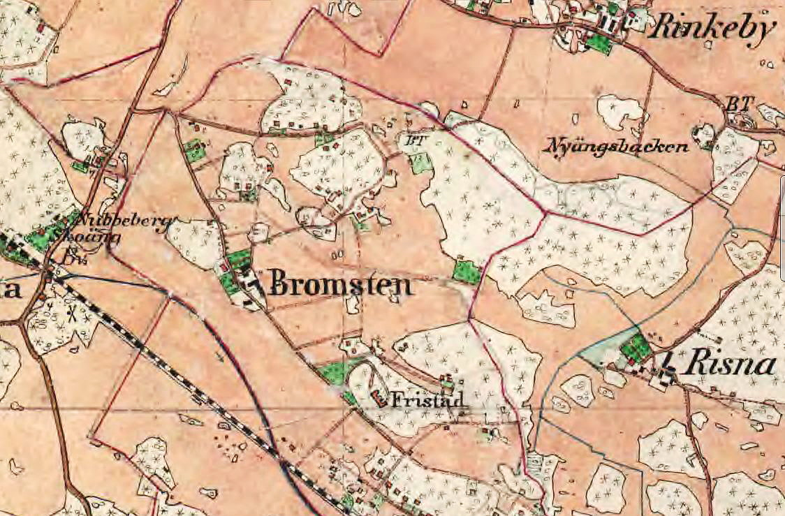 Bromsten, Rinkeby mm på Häradsekonomiska kartan